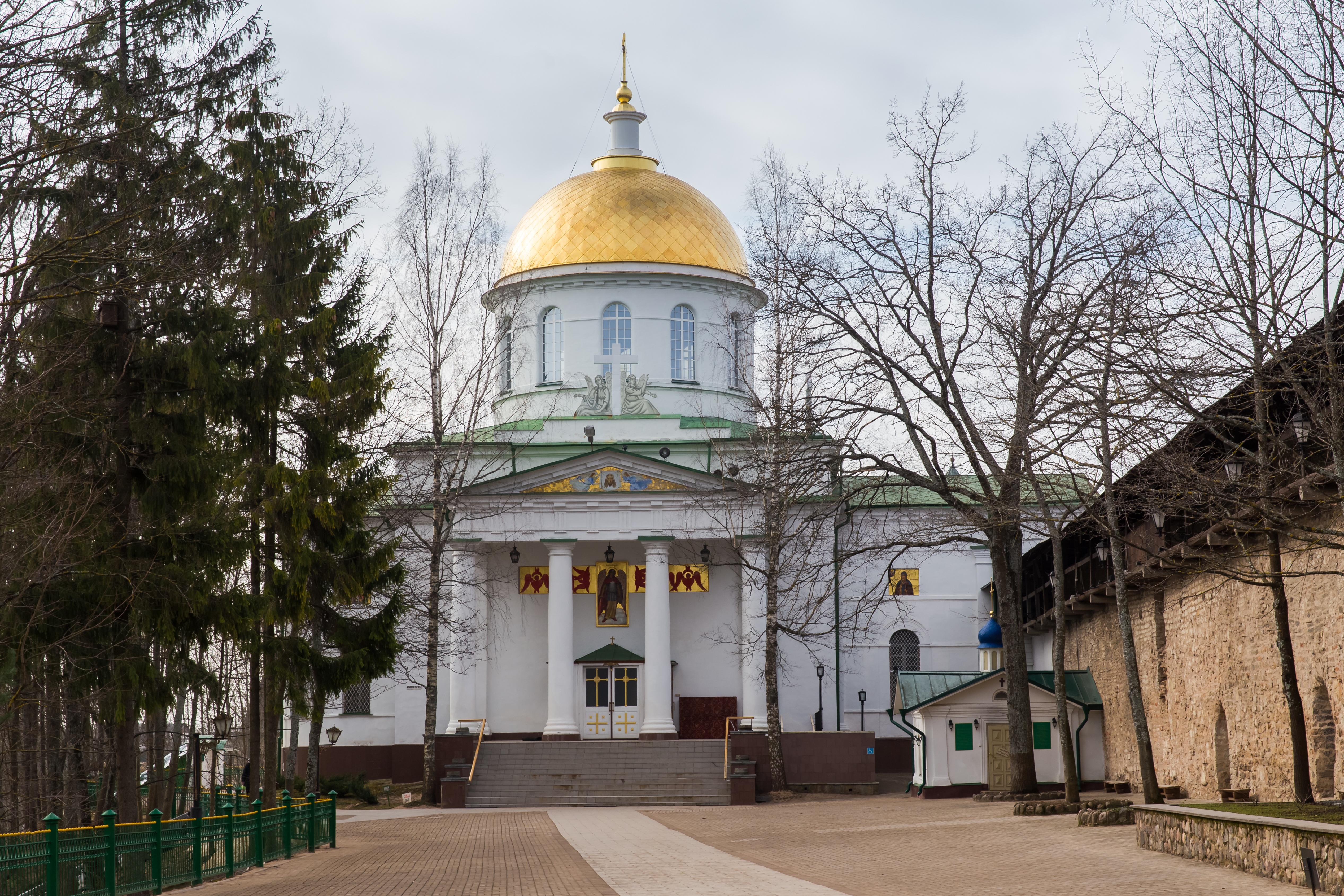 собор Михаила Архангела: Печоры, Печорский район, Псковская область